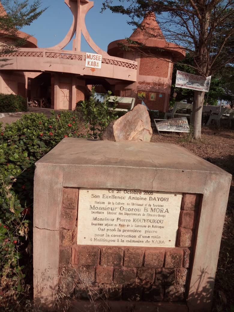 Vue de pose première Pièrre du Statut au carrefour KABA de Natitingou Bénin